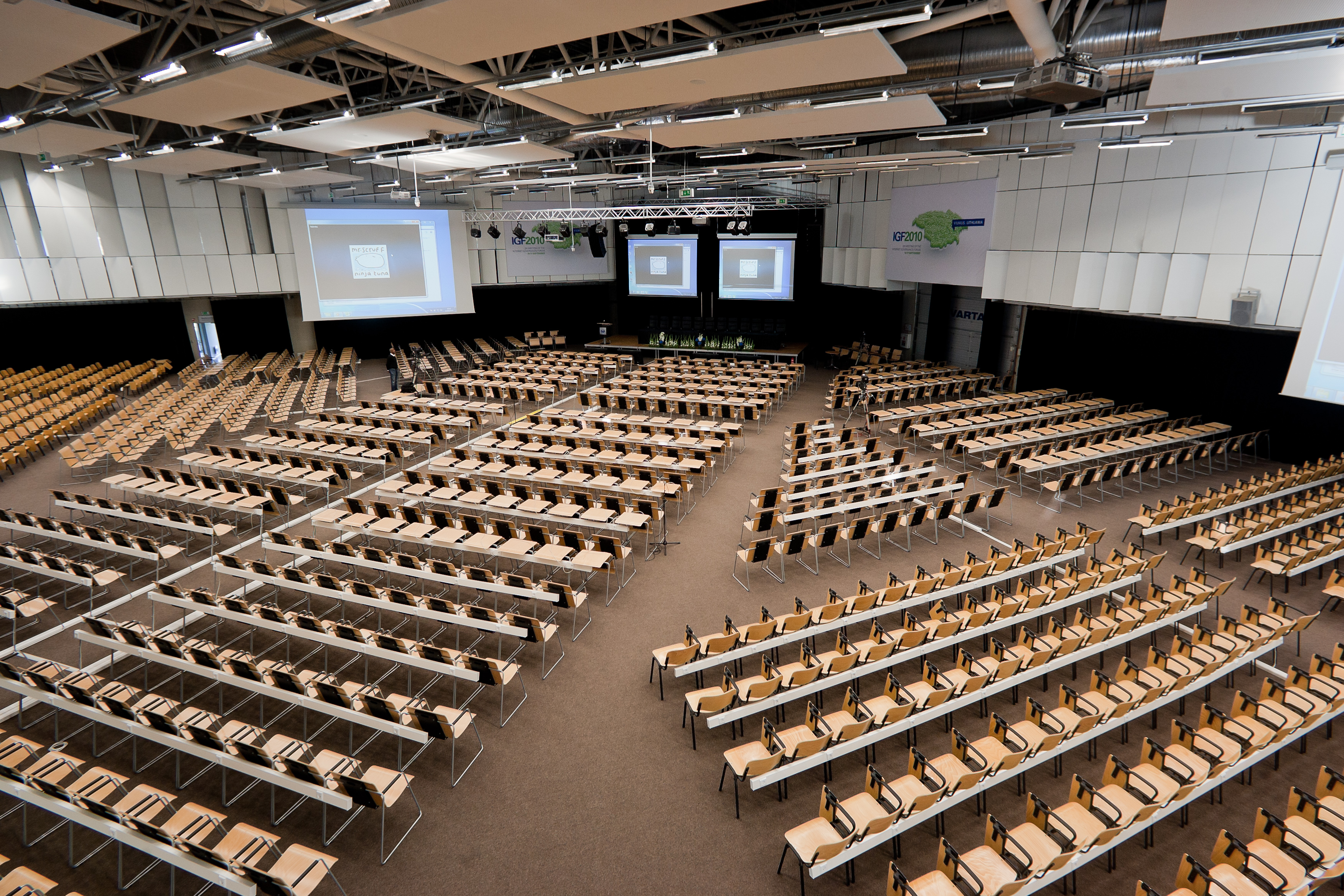 5 – oji parodų salė